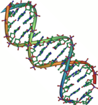 ДНК